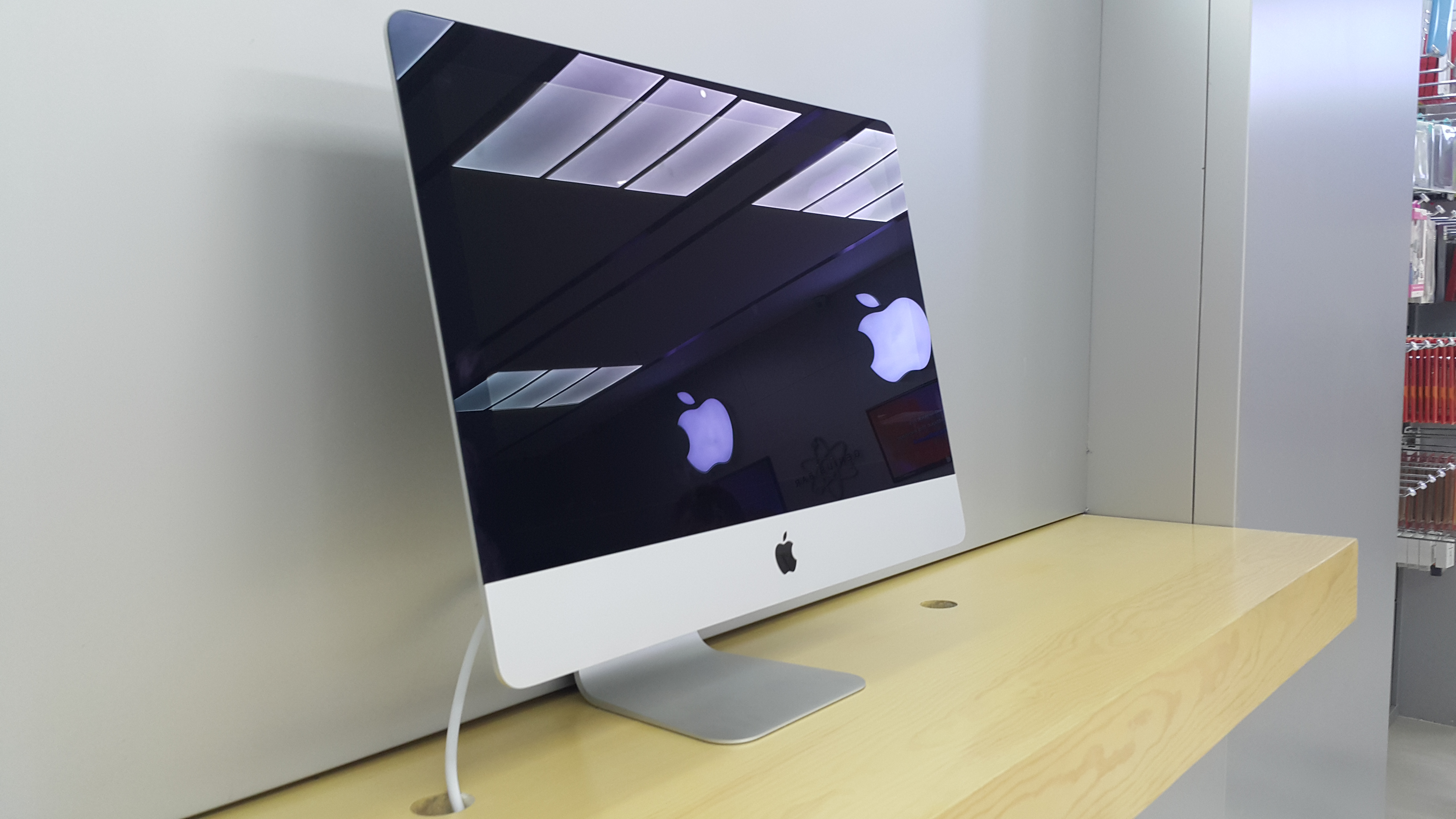 آیمک در حالت خاموش